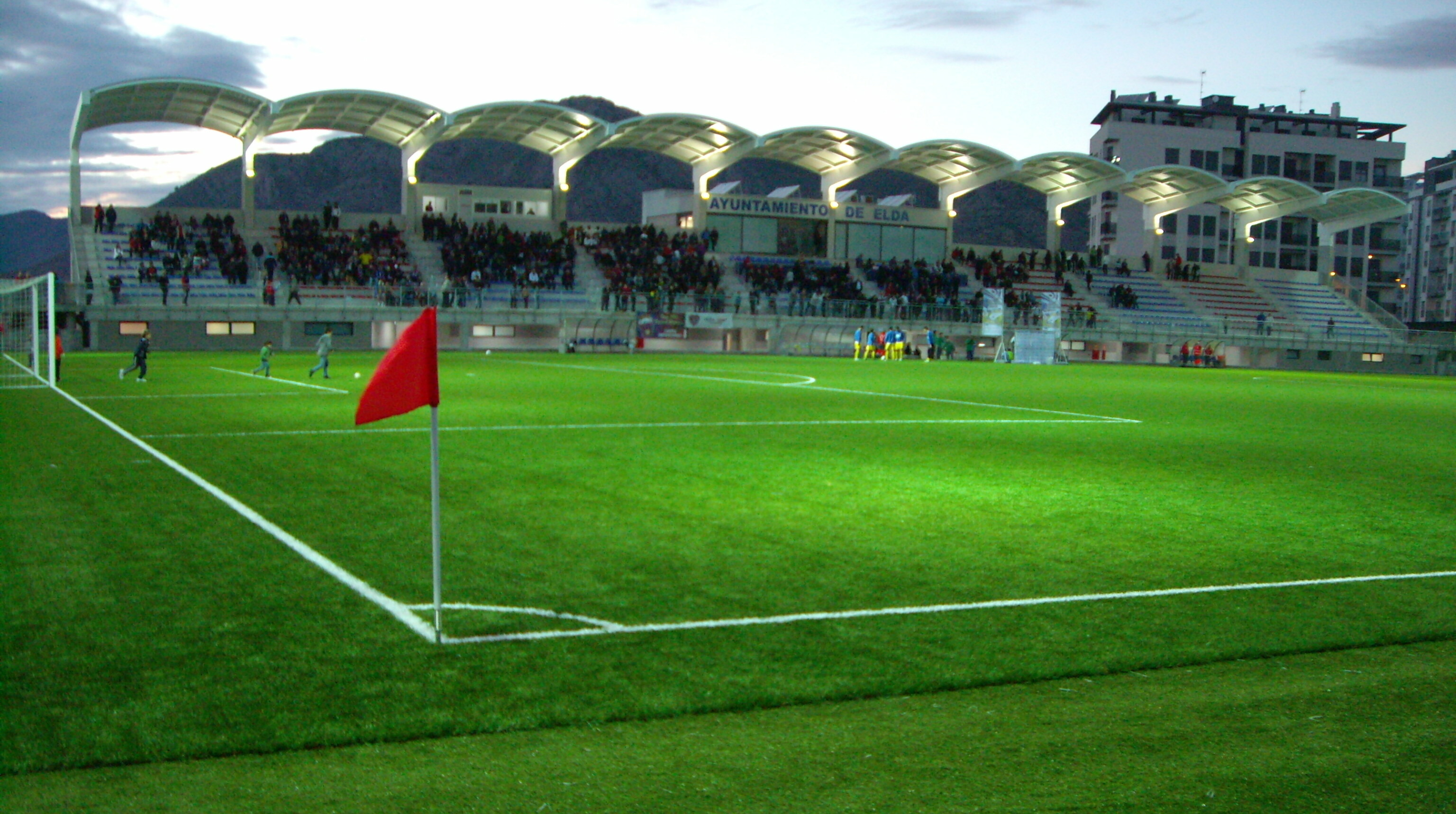 Descanso en un partido del CD Eldense en el Nuevo Pepico Amat